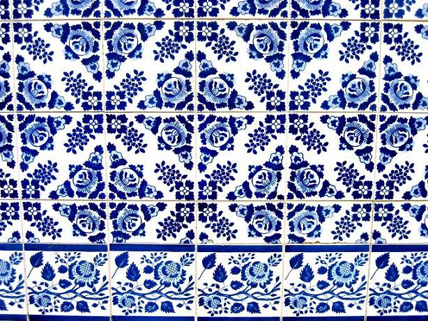 Azulejo - Igreja de Campanhã - Porto - Portugal